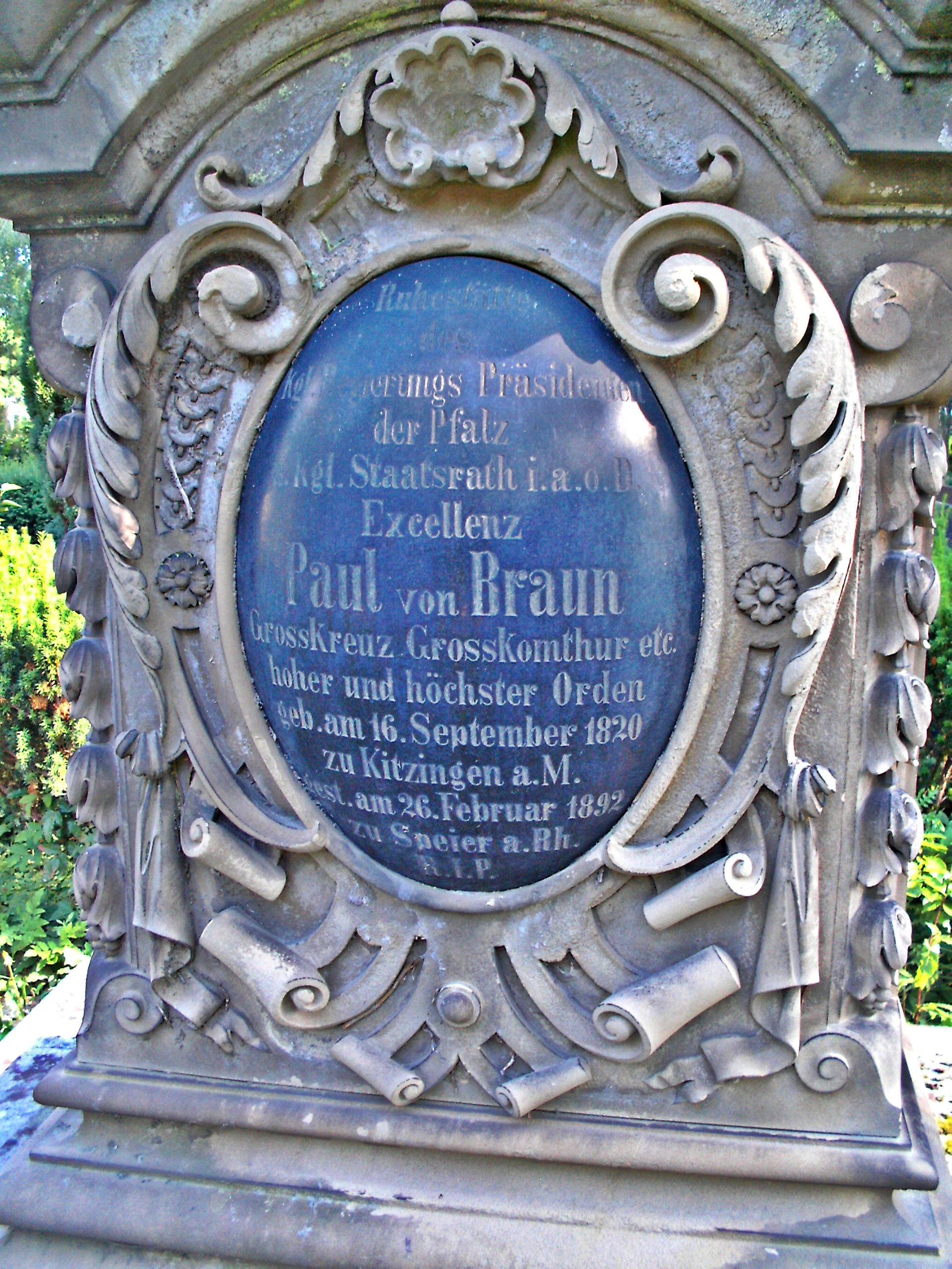 Paul von Braun, Regierungspräsident der Pfalz, Grabinschrift, Friedhof Speyer